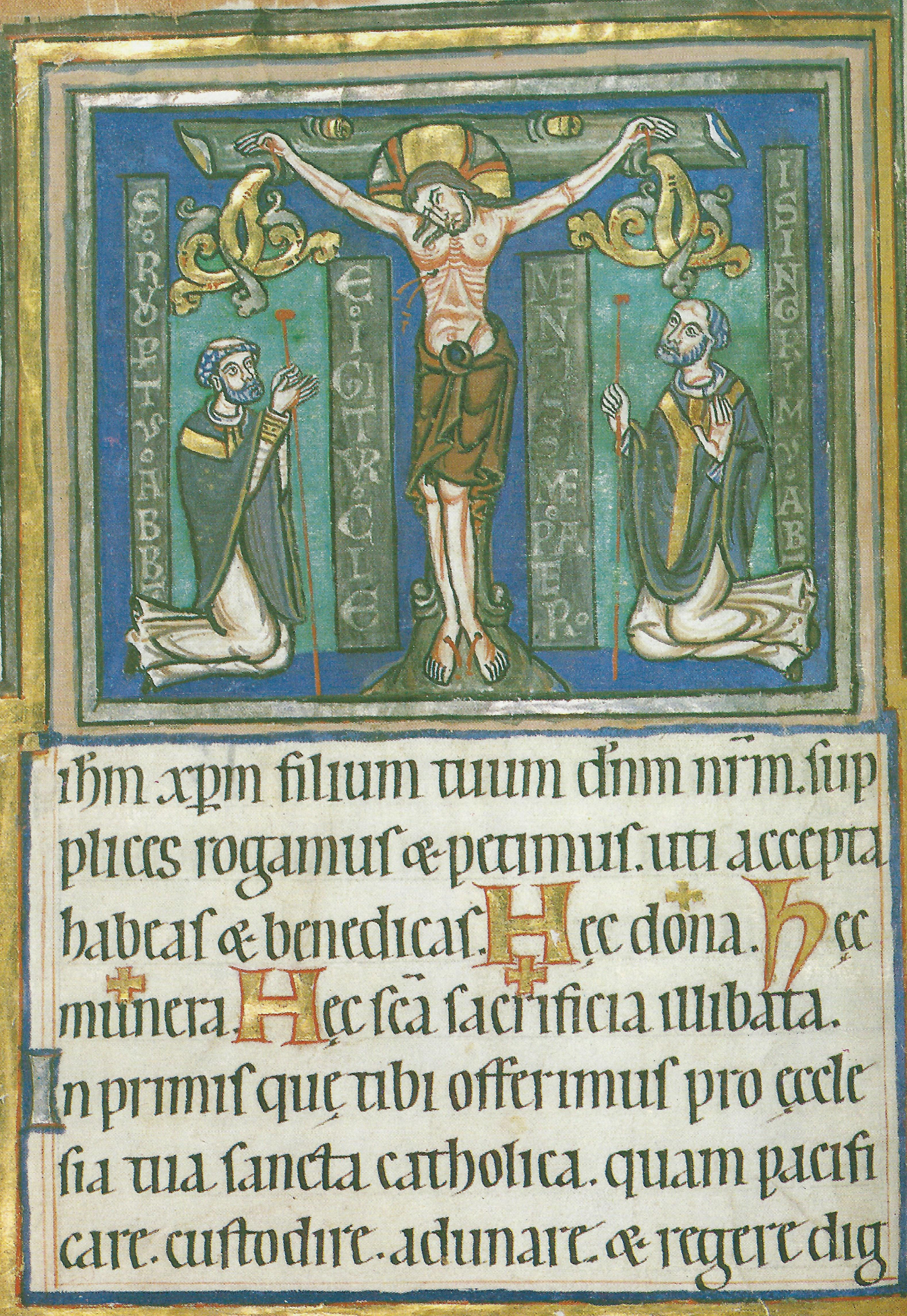 Miniatur mit den Äbten Rupert und Isingrim aus dem Ottobeurer Graduale